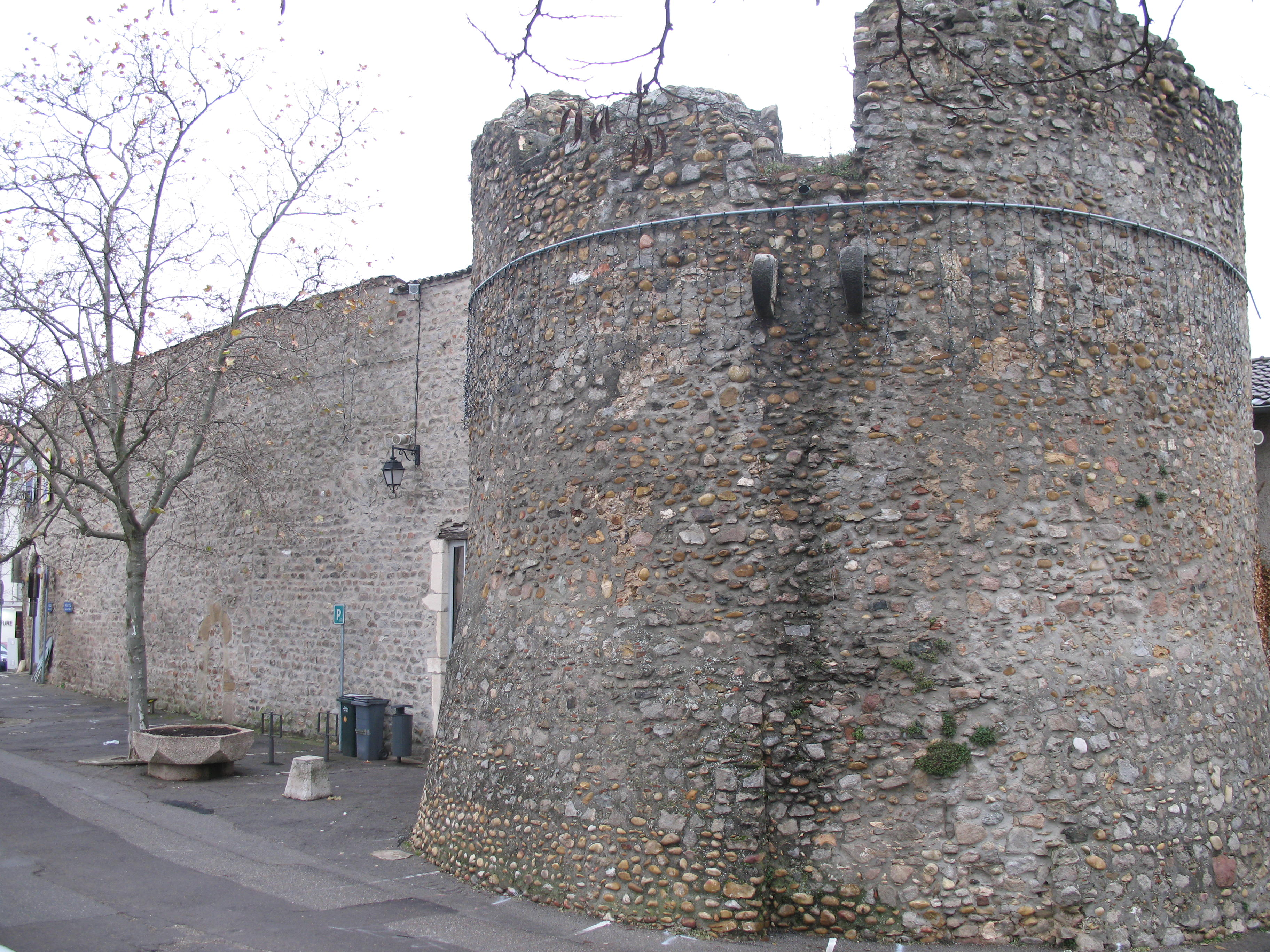 Château d'Irigny dans le Rhône